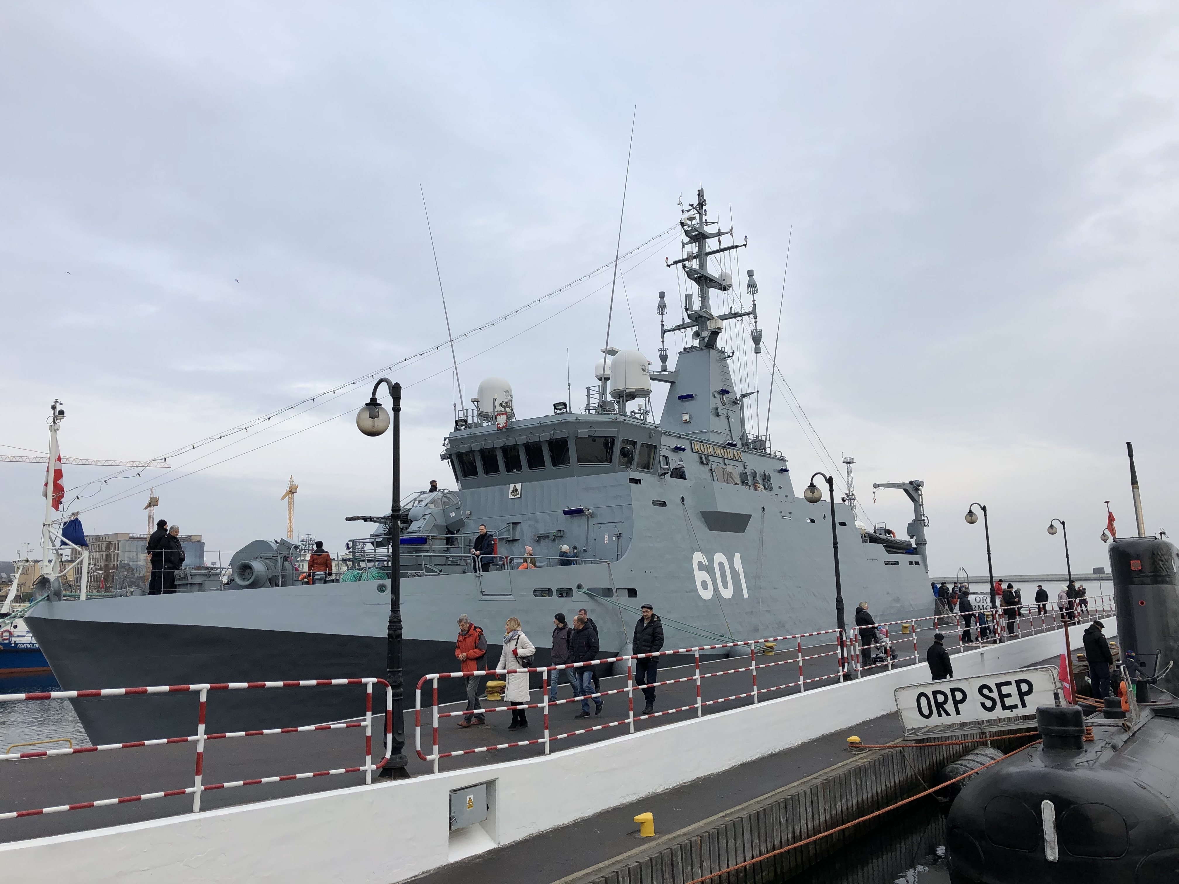 ORP Kormoran (obok: ORP Sęp) przy kei koło Mola Południowego w Gdyni podczas pikniku marynarskiego z okazji stulecia Marynarki Wojennej, listopad 2018 rok